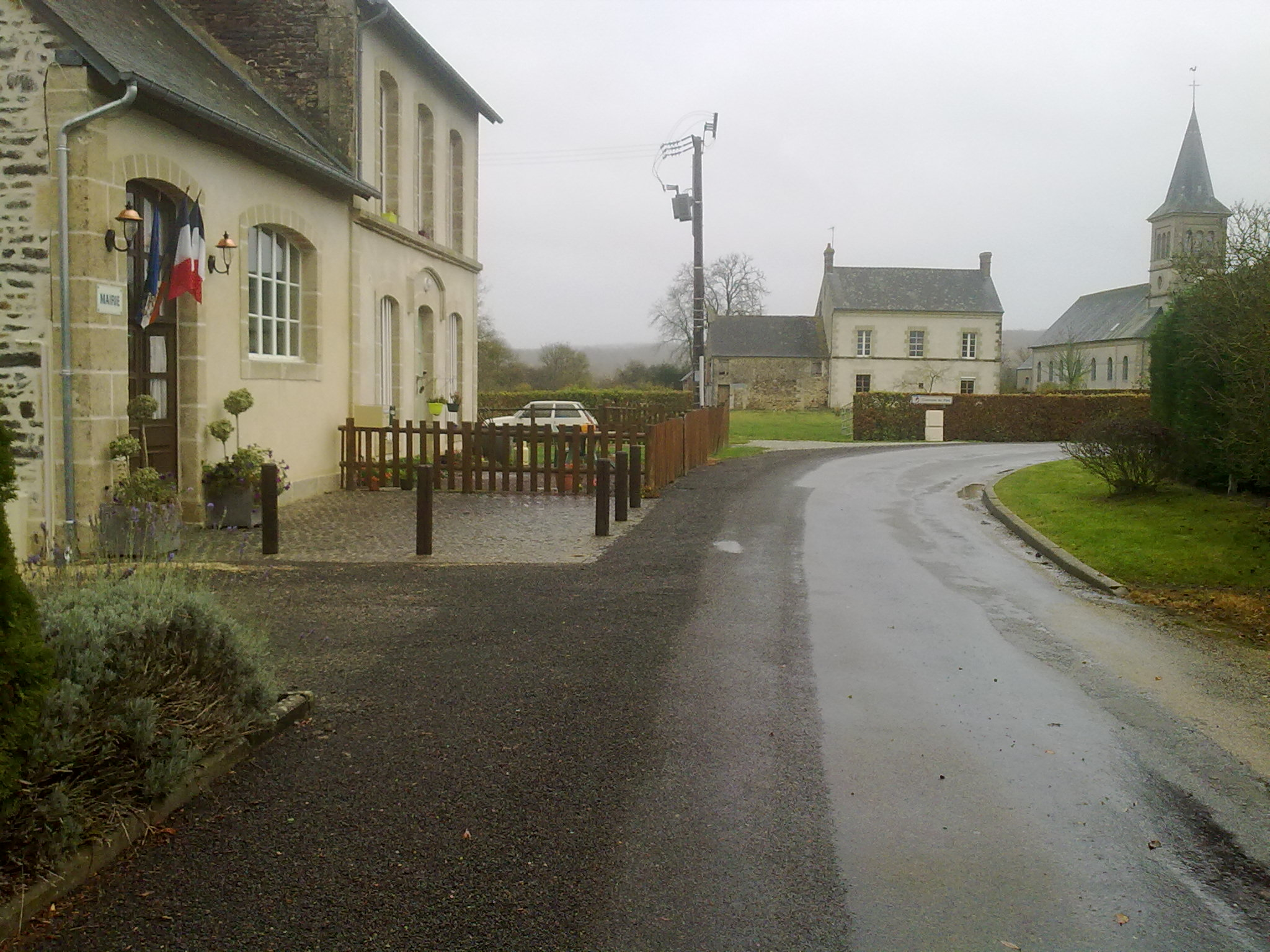 Mairie de La Bellière